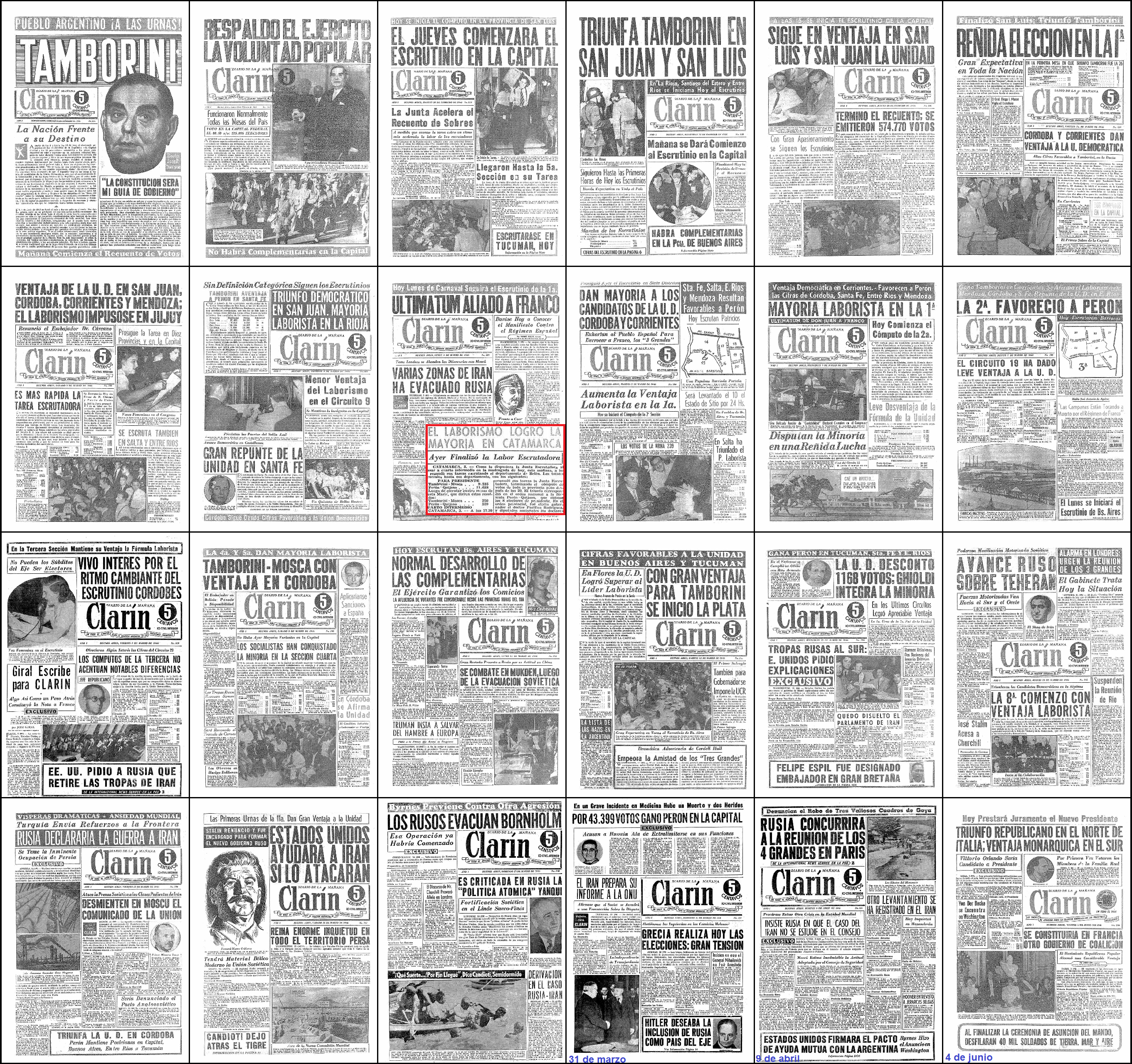 Collage con las portadas del diario Clarín (Argentina), del 24 de febrero al 16 de marzo de 1946, y del 31 de marzo, 9 de abril, y 4 de junio del mismo año, reflejando el sesgo del diario ante la victoria electoral de Juan Domingo Perón (Partido Laborista, UCR Junta Renovadora, Partido Independiente) ante el radical José Tamborini (Unión Democrática). Collage realizado con las tapas del diario de dichas fechas, cuyo derecho de autor ha expirado en Argentina.